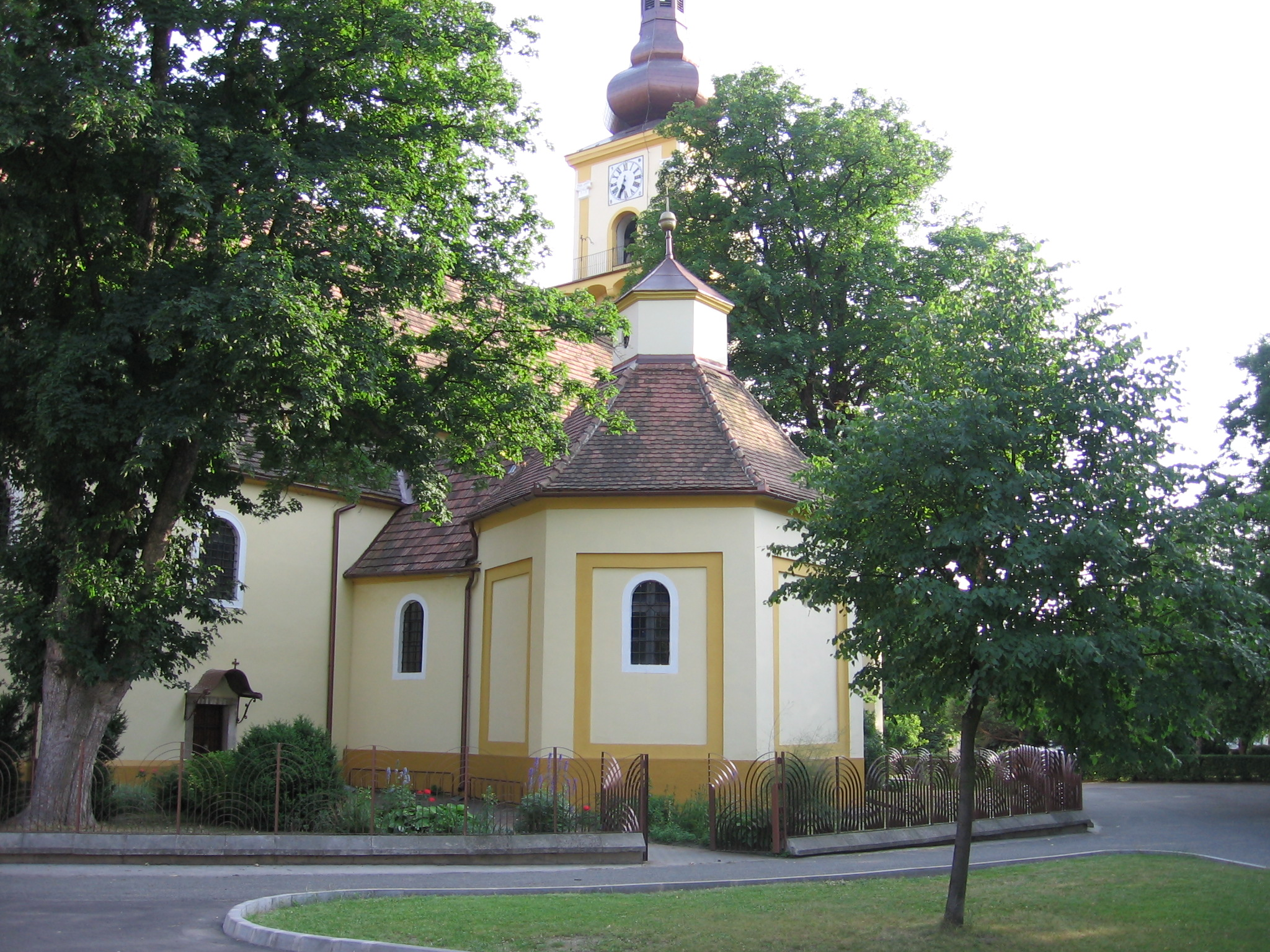 Kategória:Obrázky budov Kategória:Presunúť na Commons